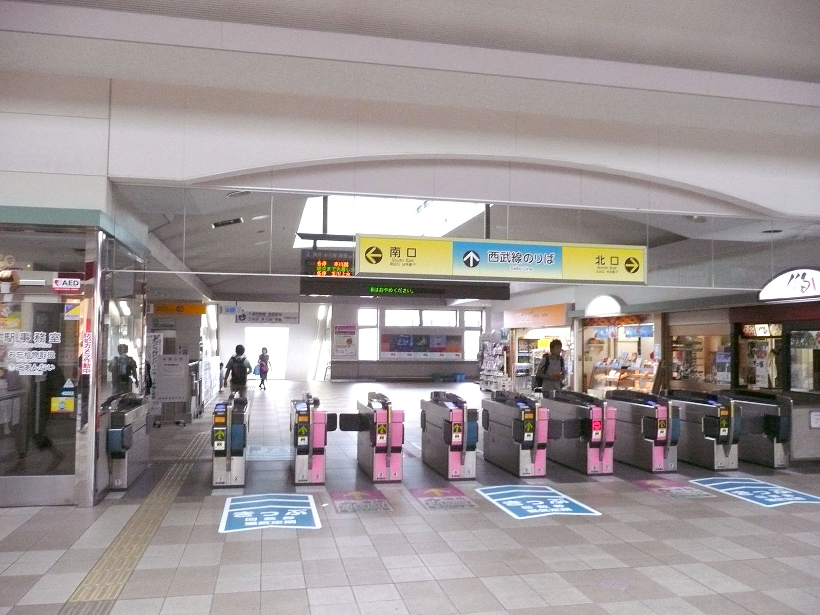 花小金井駅改札口